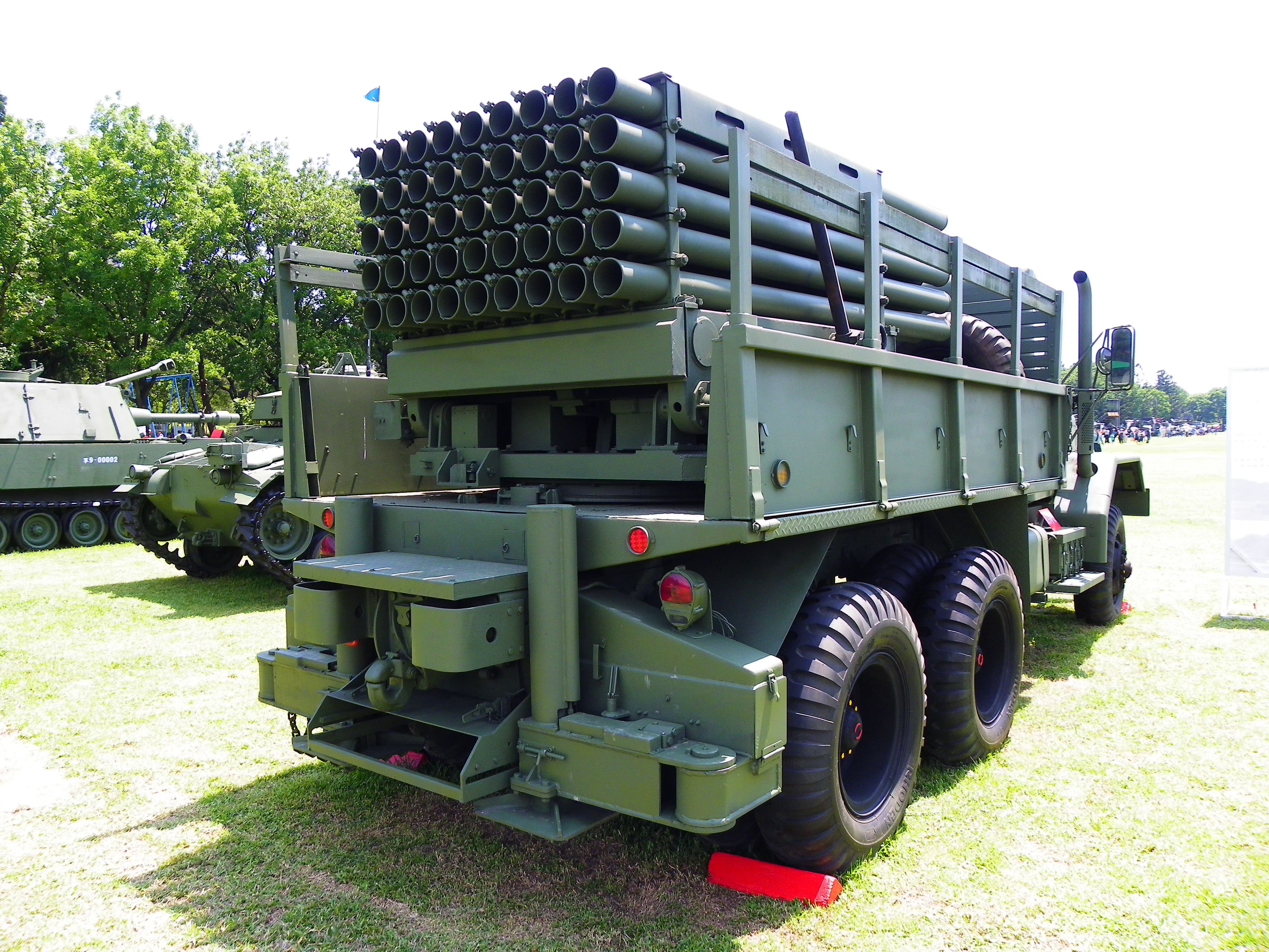 2014年陸軍官校營區開放活動，操場展示之工蜂六型多管火箭系統右後方。